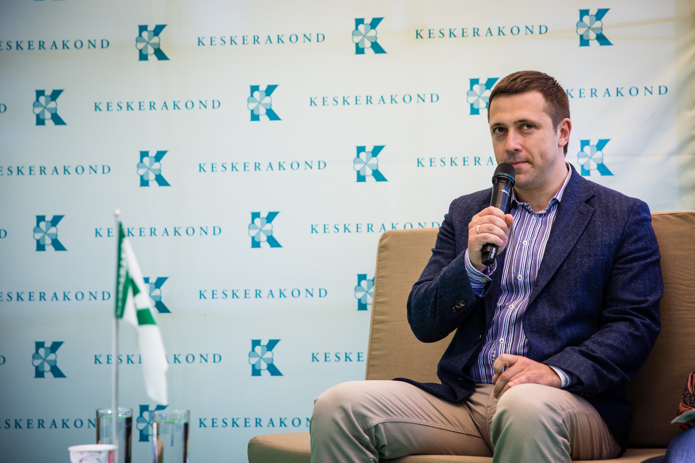 Vadim Belobrovtsev arutlemas teemal "ETV+ ehk milline on Eesti lõimumispoliitika tulevik?"